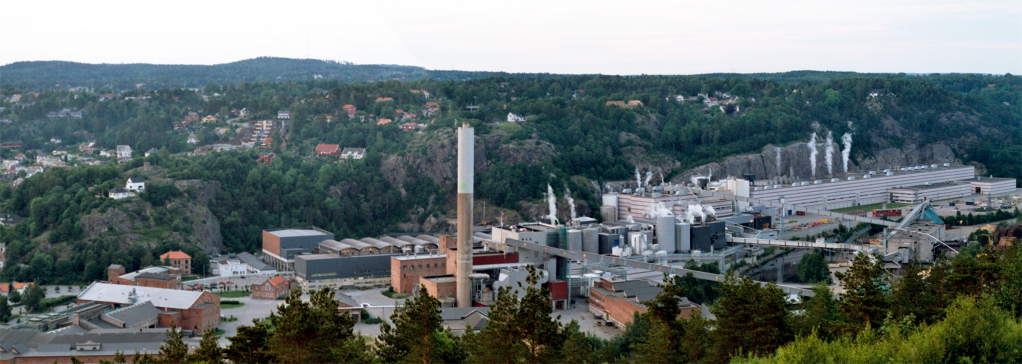 Saugbruksforeningen, Halden, Norway.